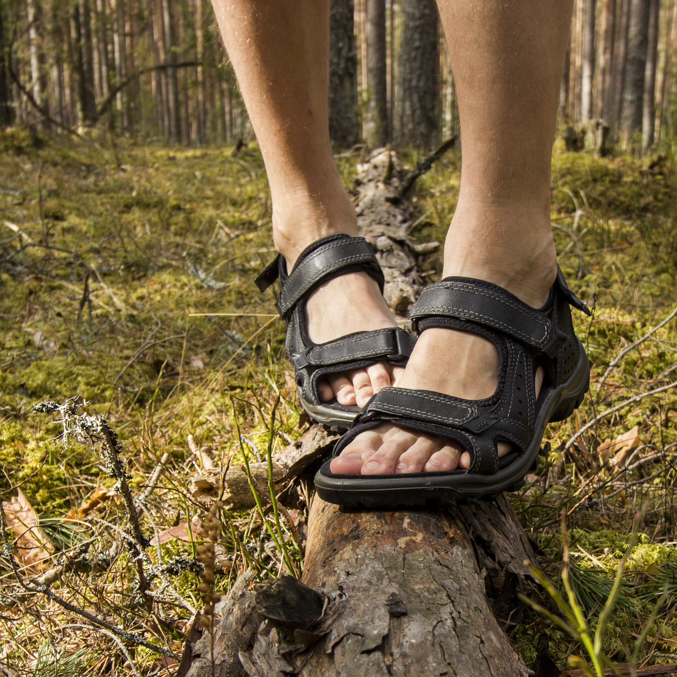 Ecco sandaalid